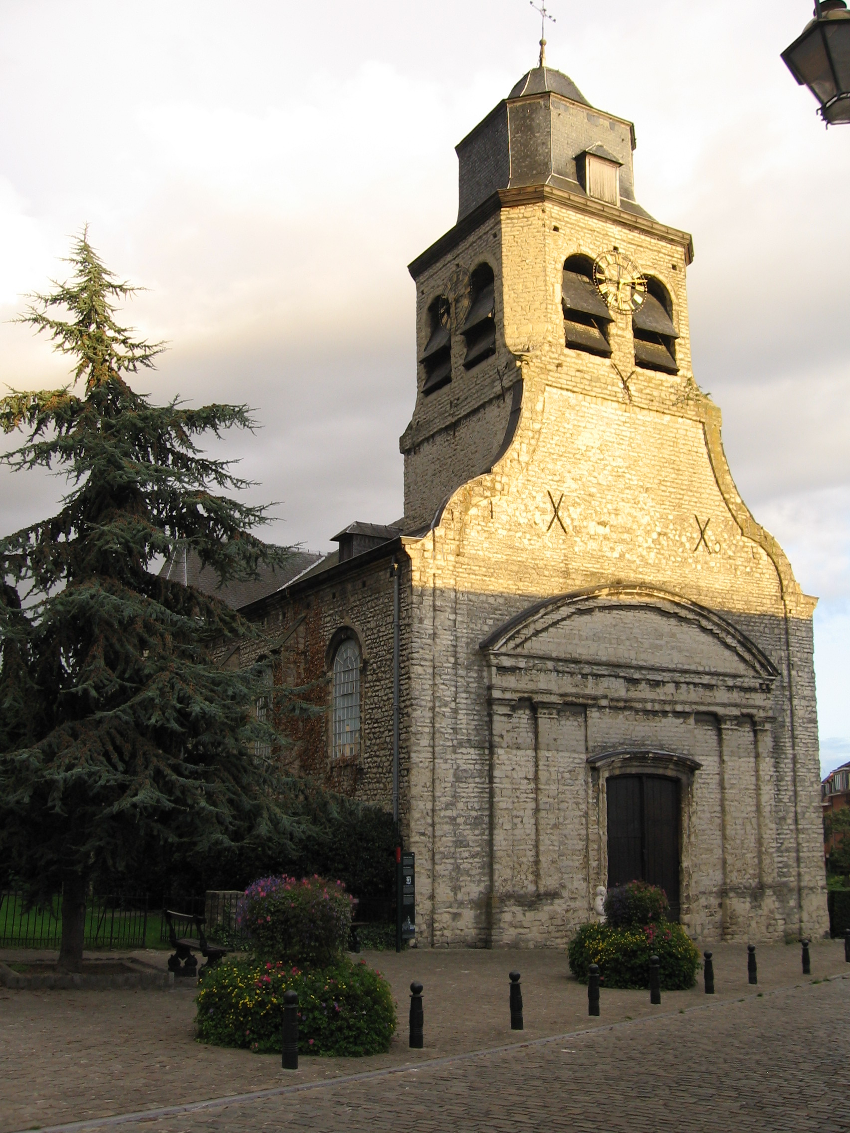 L'église Saint-Nicolas de Neder-over-Hembeek (Bruxelles) date du XIIe siècle. Elle est aujourd'hui désacralisée.